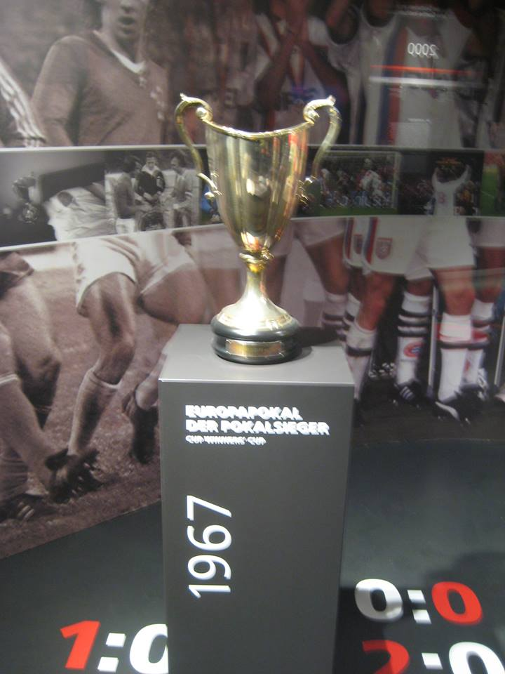 Réplique coupe des coupes 1967 remporté par le Bayern Munich